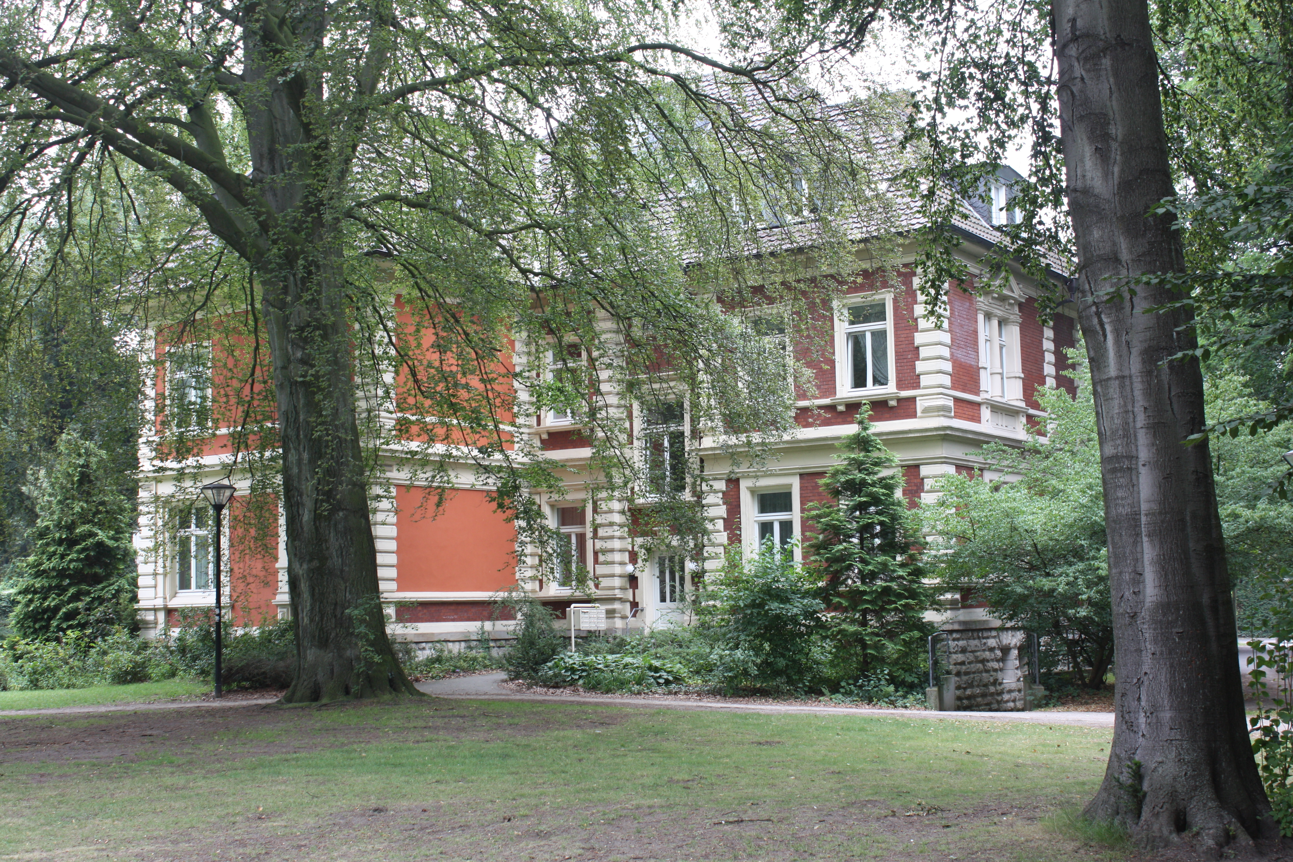 Unter den Ulmen 3 in Gütersloh, ehem. Josefshaus